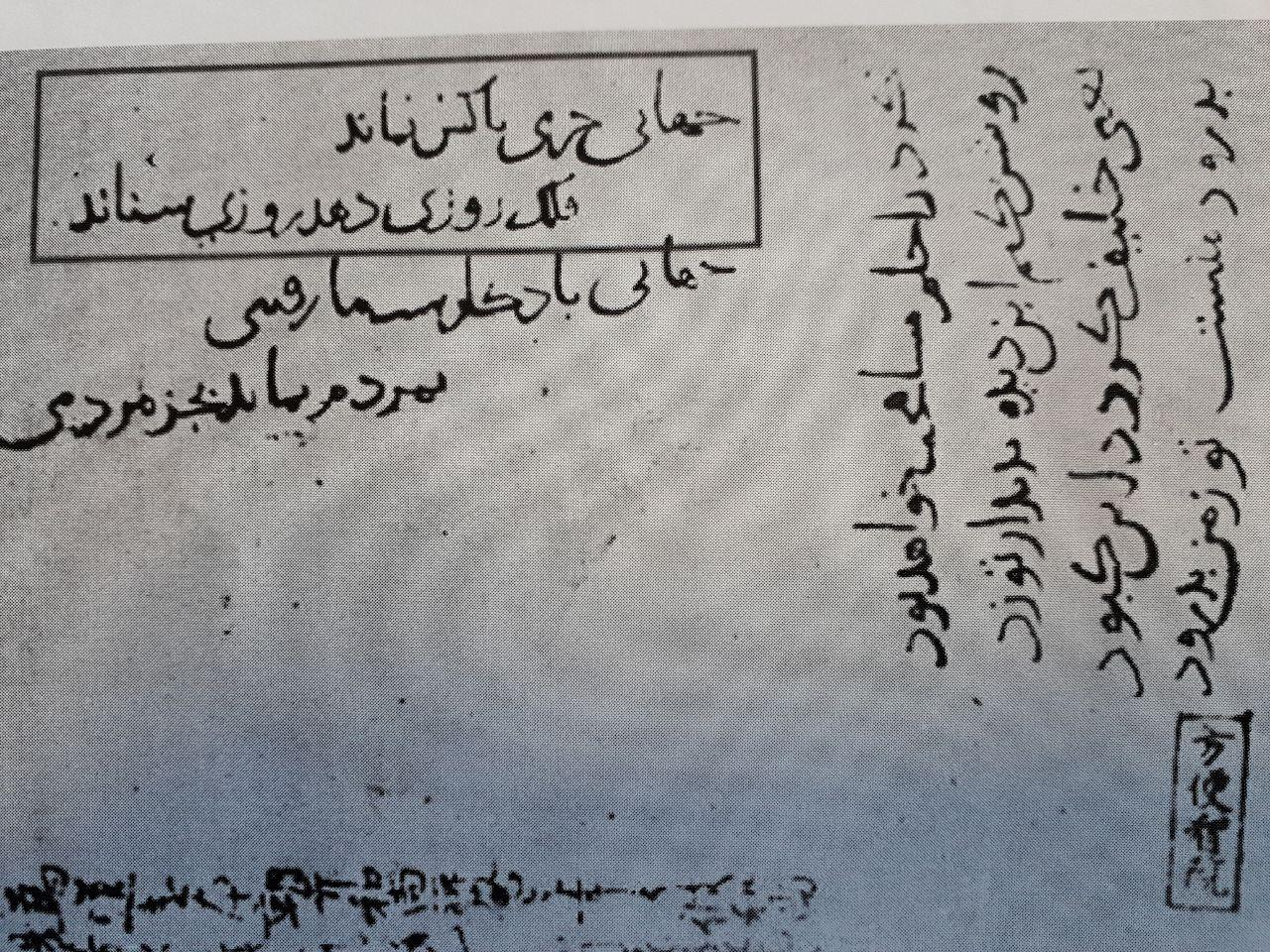 PERSIAN INSCRIPTION IN JAPAN